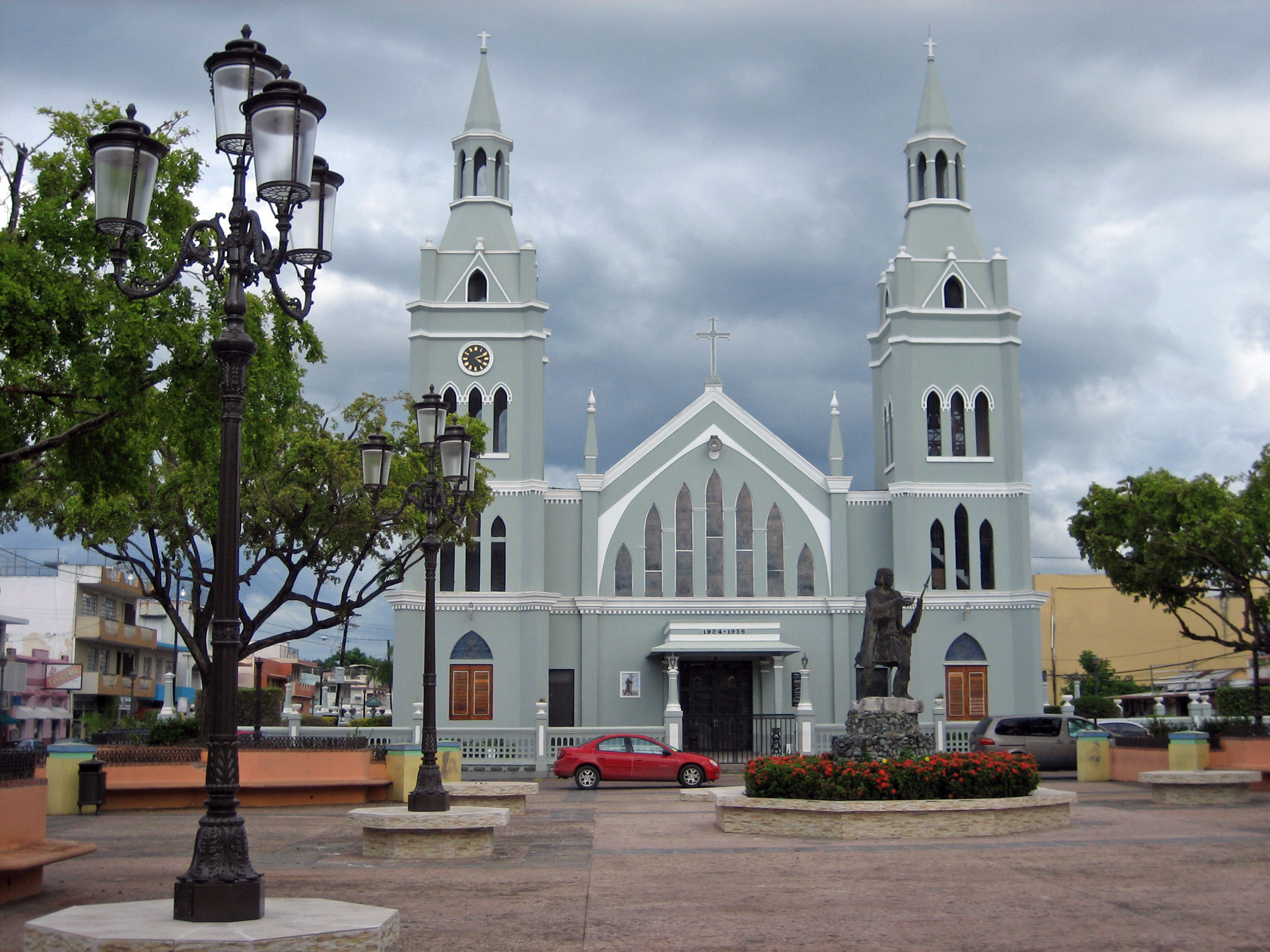 Plaza e Iglesia Católica de Aguada.